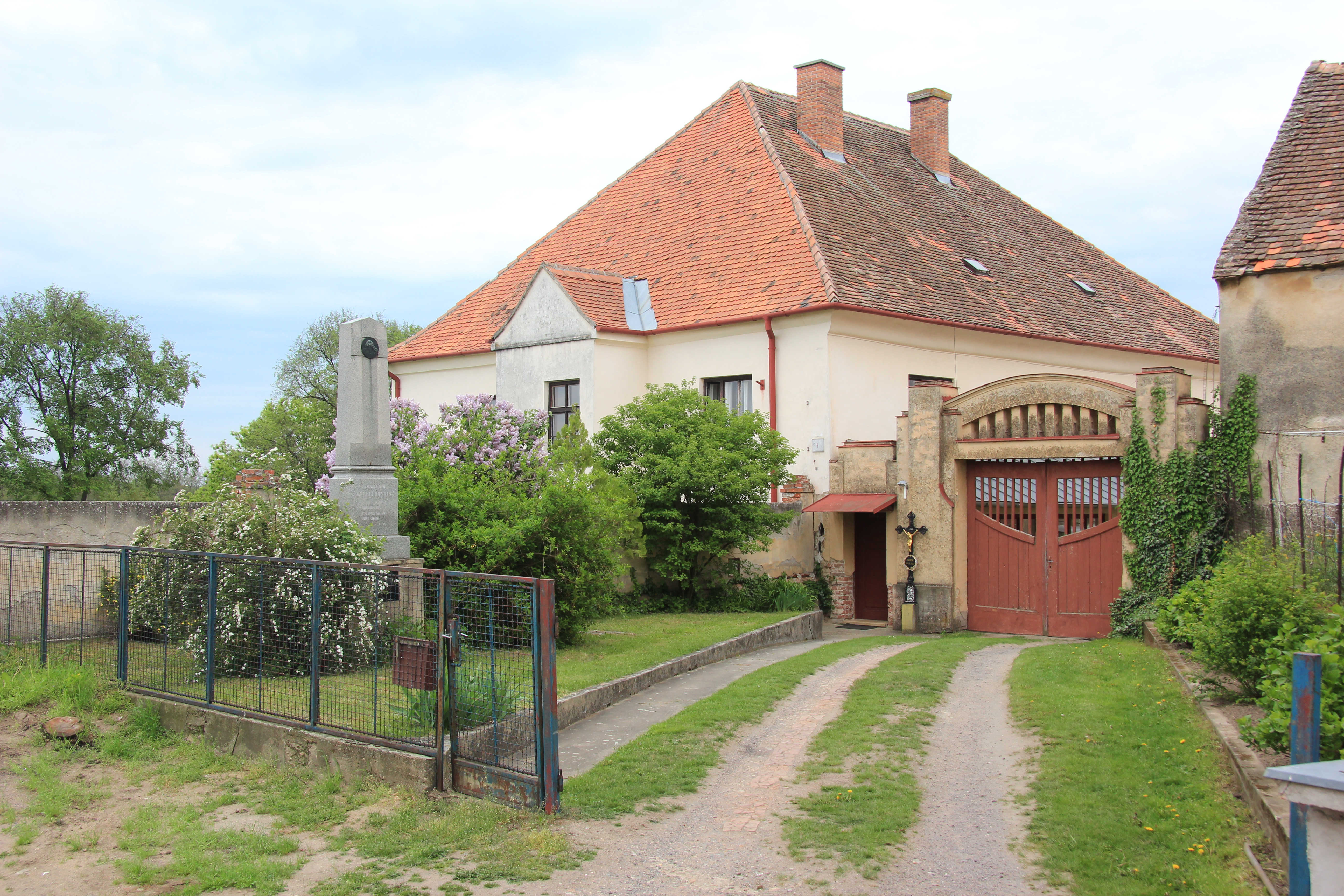 Denkmal an Vaclav Kosvak in Prosiměřice, Südmähren